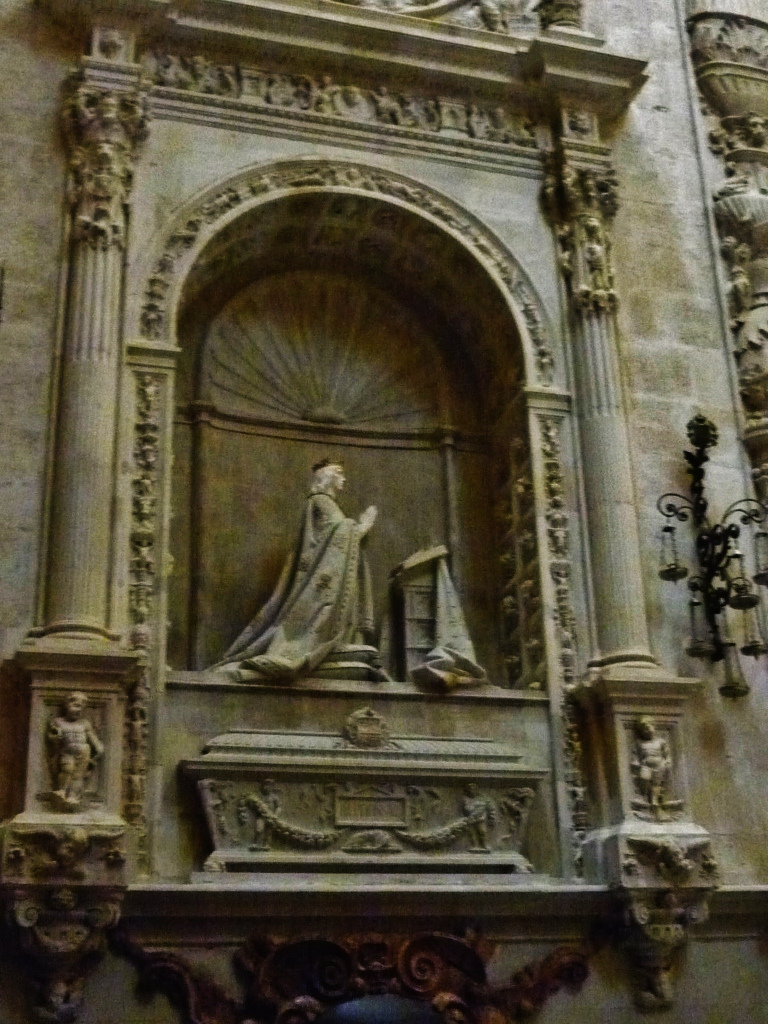 Sepulcro del rey Alfonso X el Sabio (1221-1284) en la Capilla Real de la catedral de Sevilla, (España).